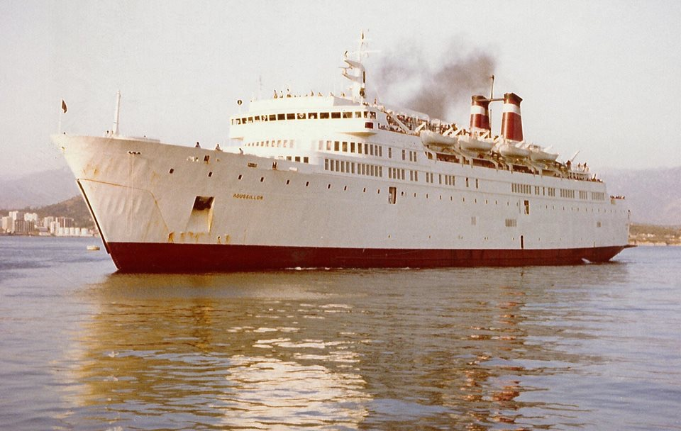 Le Roussillon en 1975 à Ajaccio.